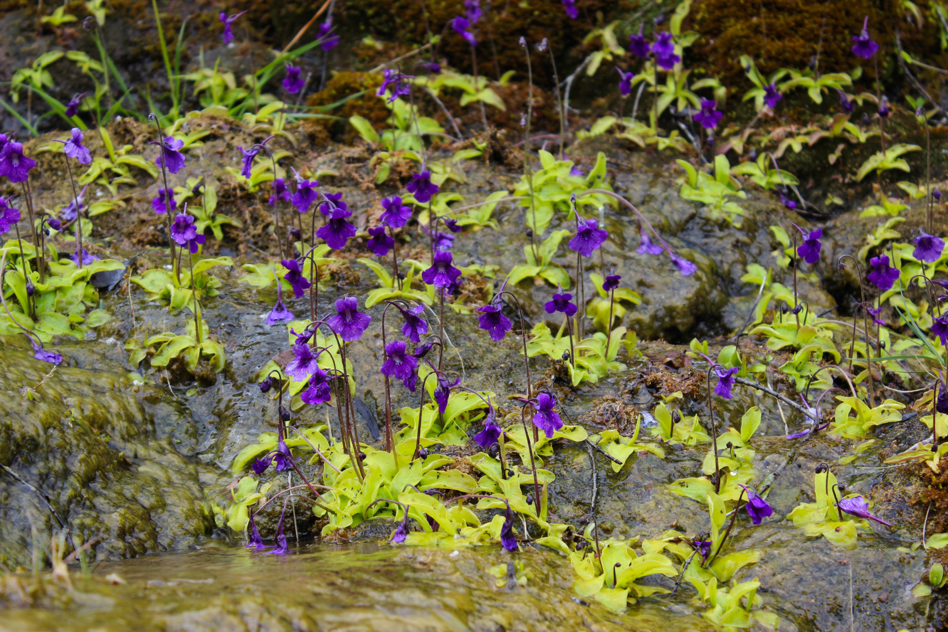 Pinguicola grandiflora, conocida como atrapamoscas en Las Salas (León)